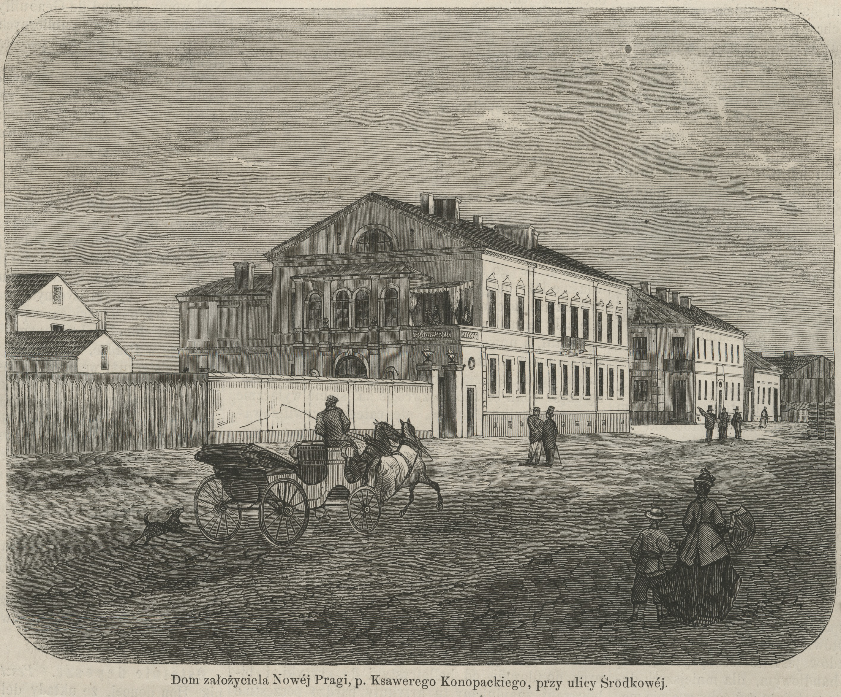 Dom założyciela Nowej Pragi, p. Ksawerego Konopackiego, przy ulicy Środkowej